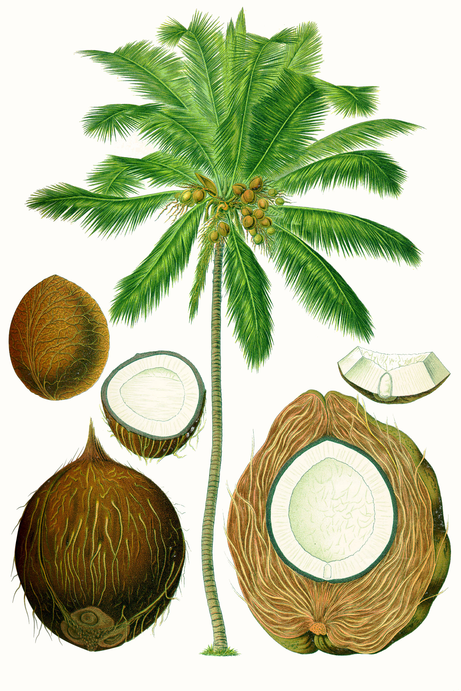 Kokospalme. A Habitusbild eines Baumes; 1 Frucht im Längsschnitt; 2 Steinkern nach Entfernung der mittleren und äusseren Fruchtschale; 3 derselbe quer durchschnitten; 4 Endosperm nach Entfernung der Steinschale (Koprah); 5 ein Stück des Endosperms mit dem Embryo.